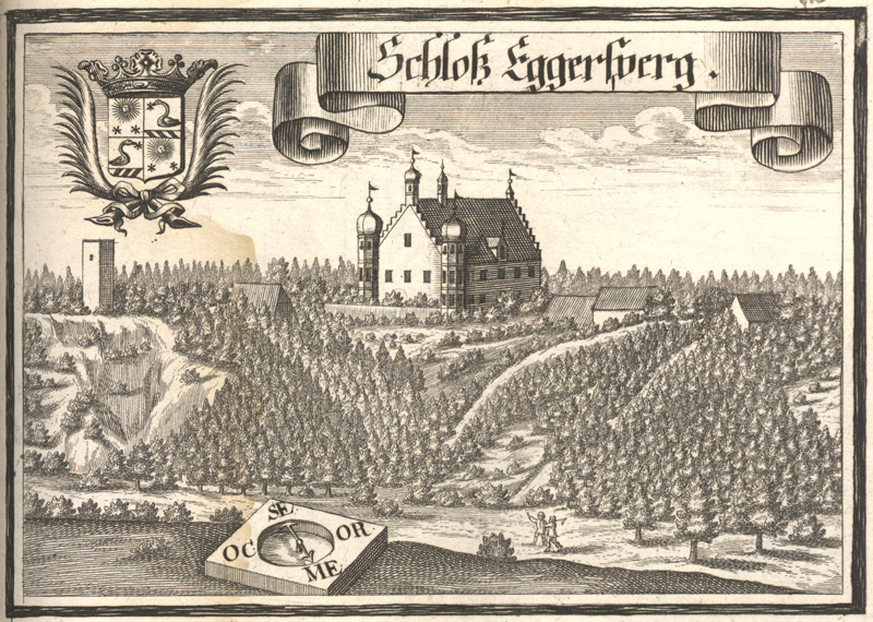 Das Schloss Eggersberg über dem Altmühltal, Obereggersberg bei Riedenburg, Kupferstich von Michael Wening. "Historico-Topographica Descriptio [...] Erster Thail", München: Johann Lucas Straub 1701. 11,8 x 16,9 cm